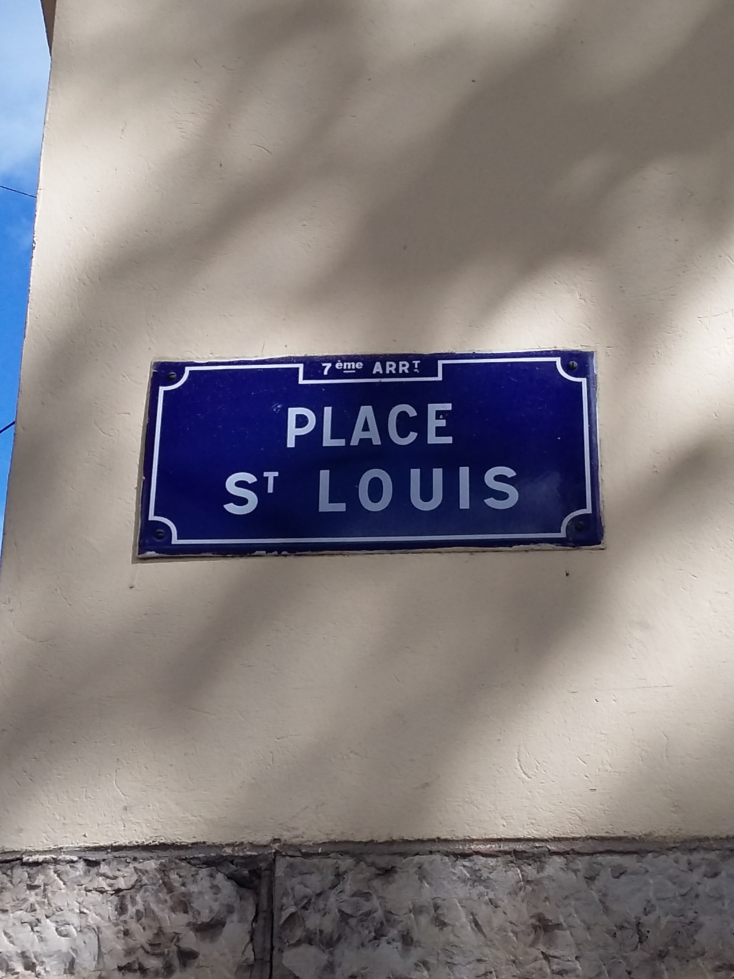 Plaque de la place Saint-Louis à Lyon (France).